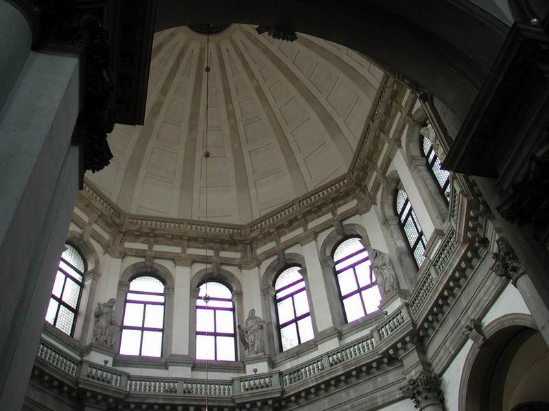 interno della chiesa della salute a venezia